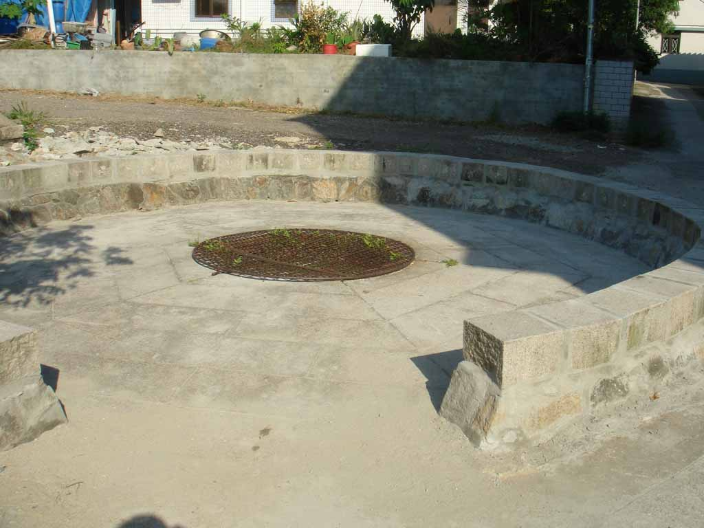 中文（香港）: 香港屏山古井。